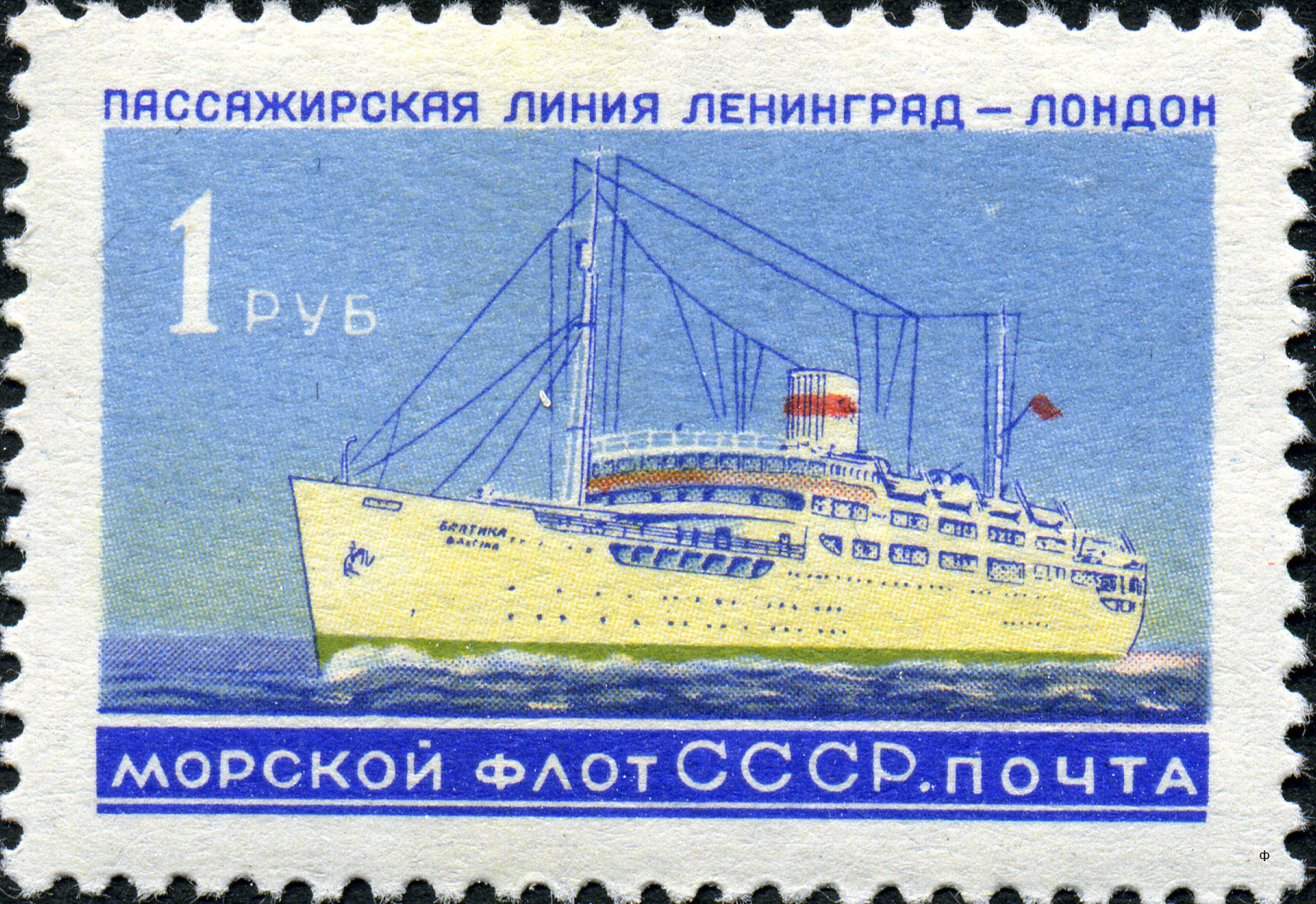 Марка СССР